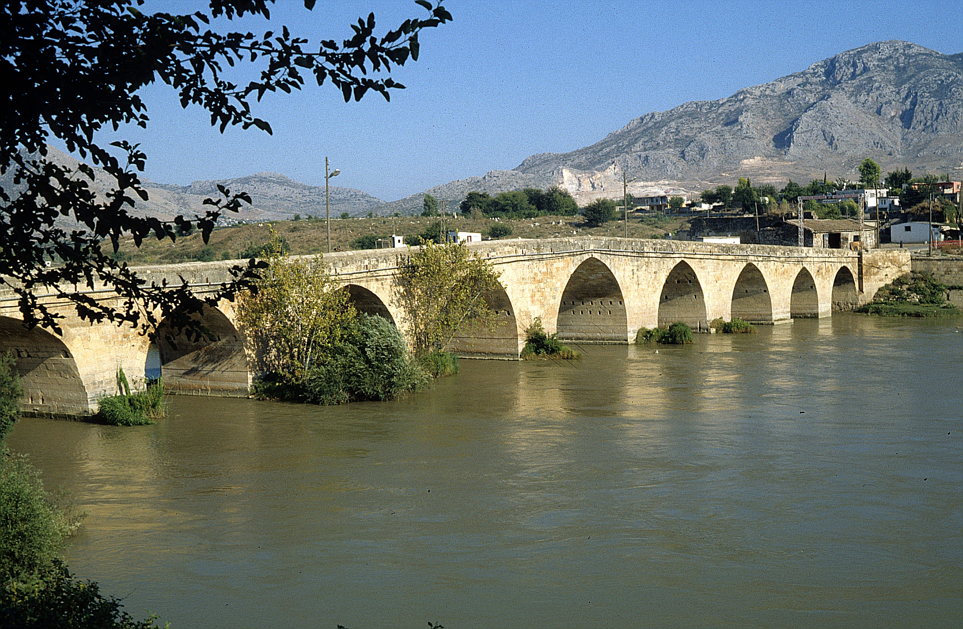 Römische Brücke in Misis-Mopsuestia, Türkei